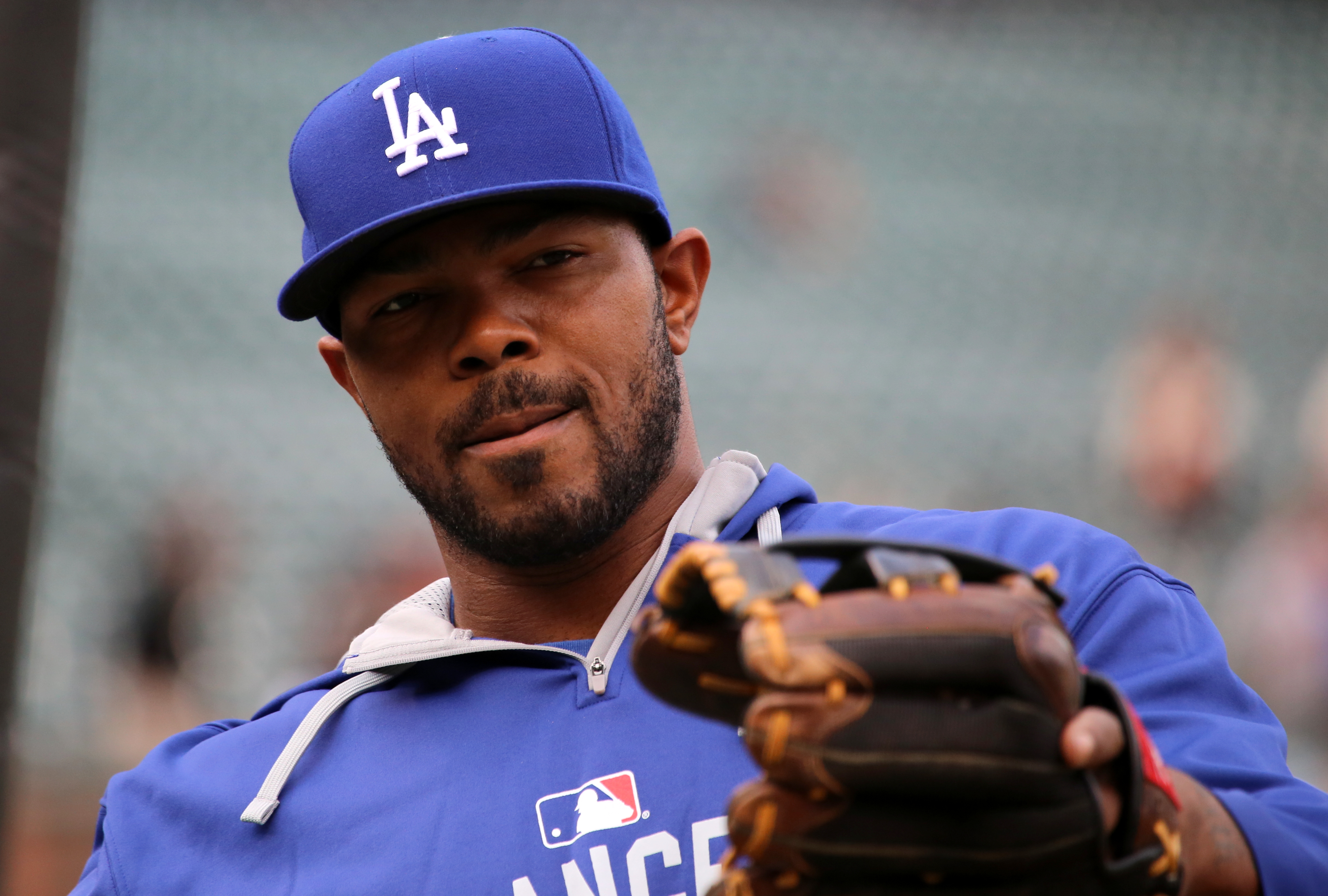 Howie Kendrick